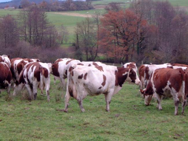 Je suis l'auteur de cette photo prise le 23/11/06 dans la campagne autour de Montbéliard.